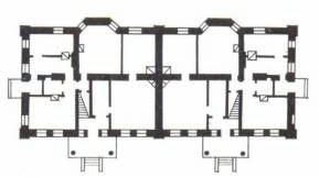 План 1 паверха дома па вуліцы Леніна, 39 (Брэст)